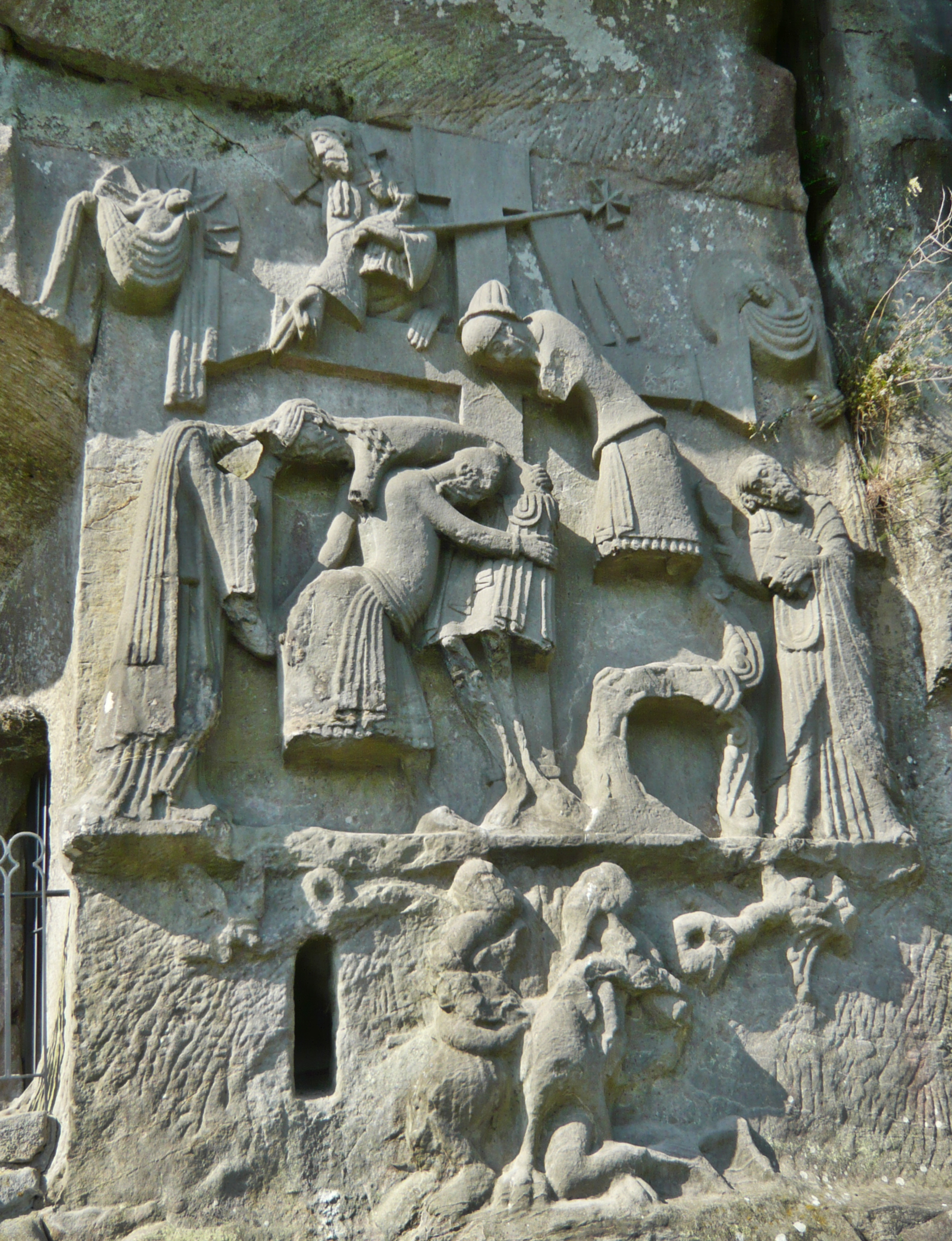 Kreuzabnahme-Relief an den Externsteinen